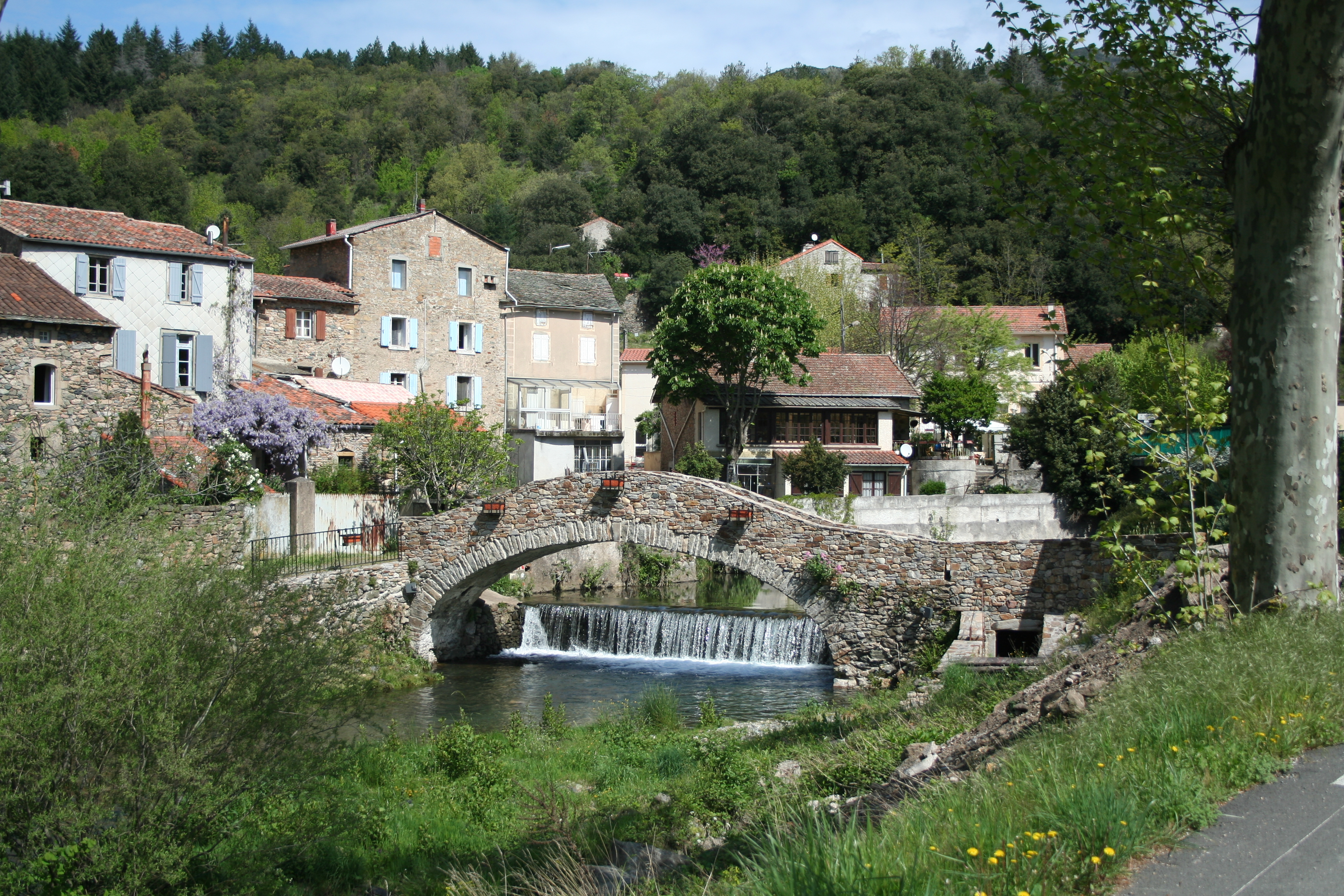 Saint-Geniès-de-Varensal (Hérault) - Plaisance et le ruisseau du Bouissou.